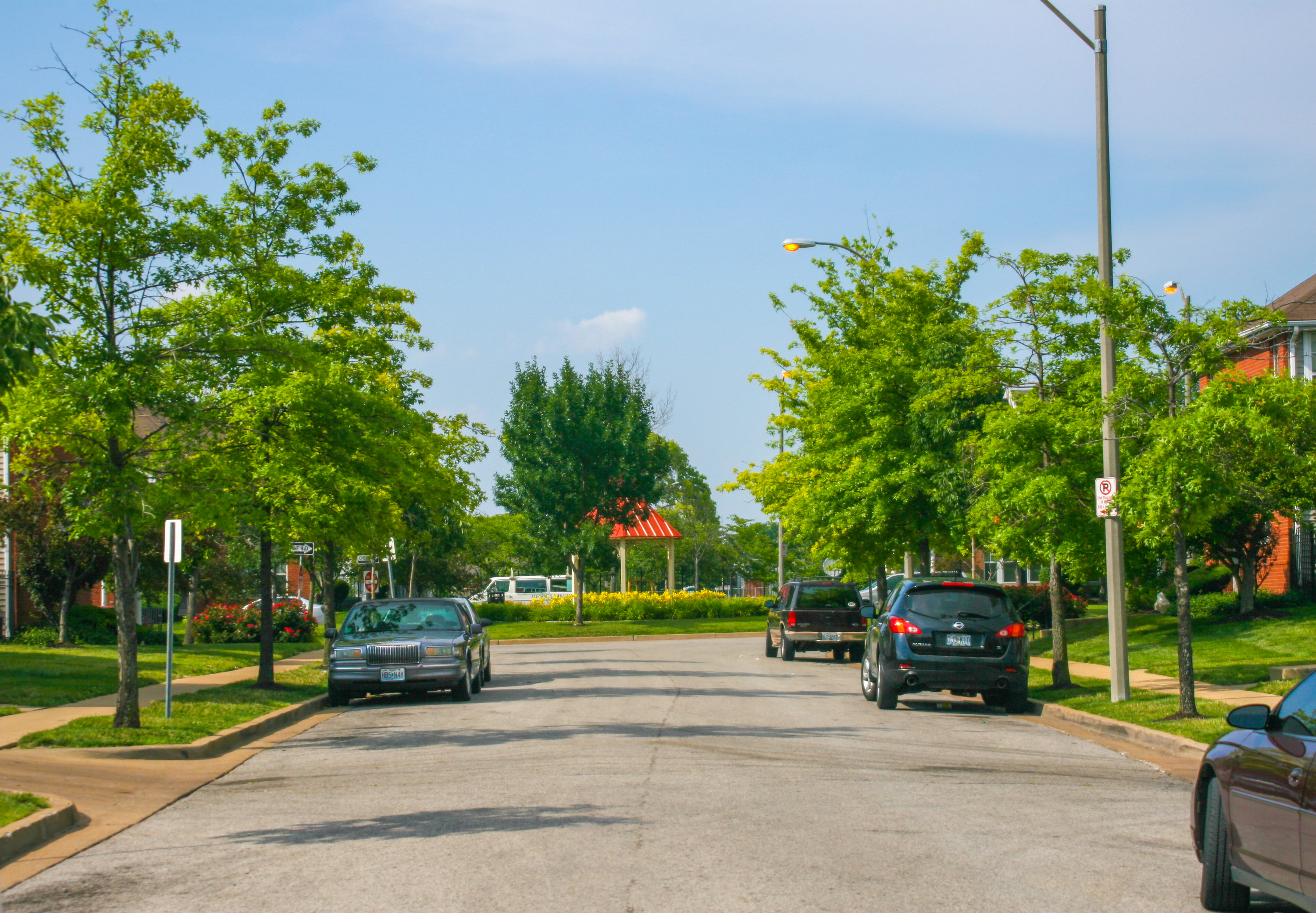 Carr Square Pavillion